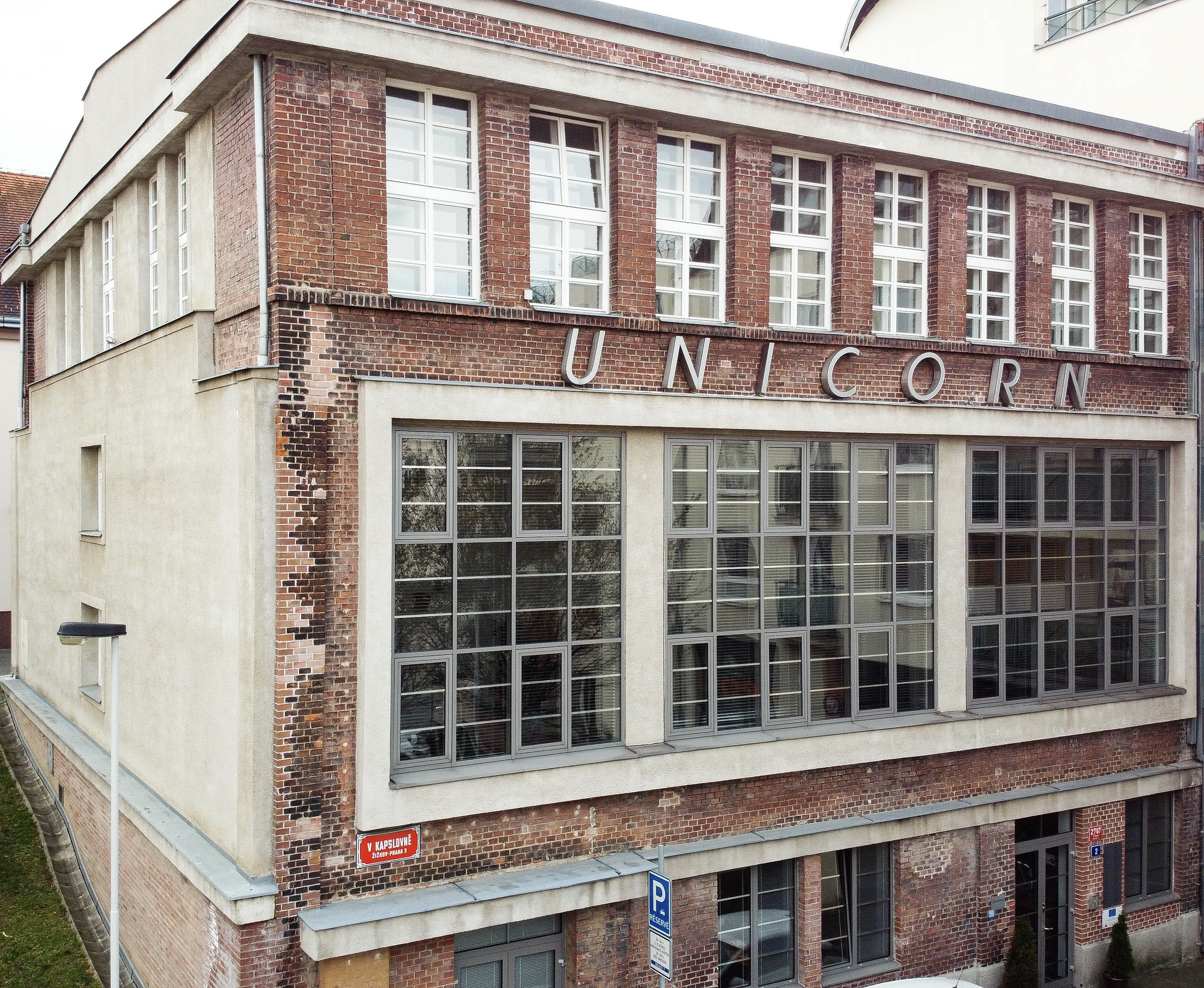 Budova Unicorn College